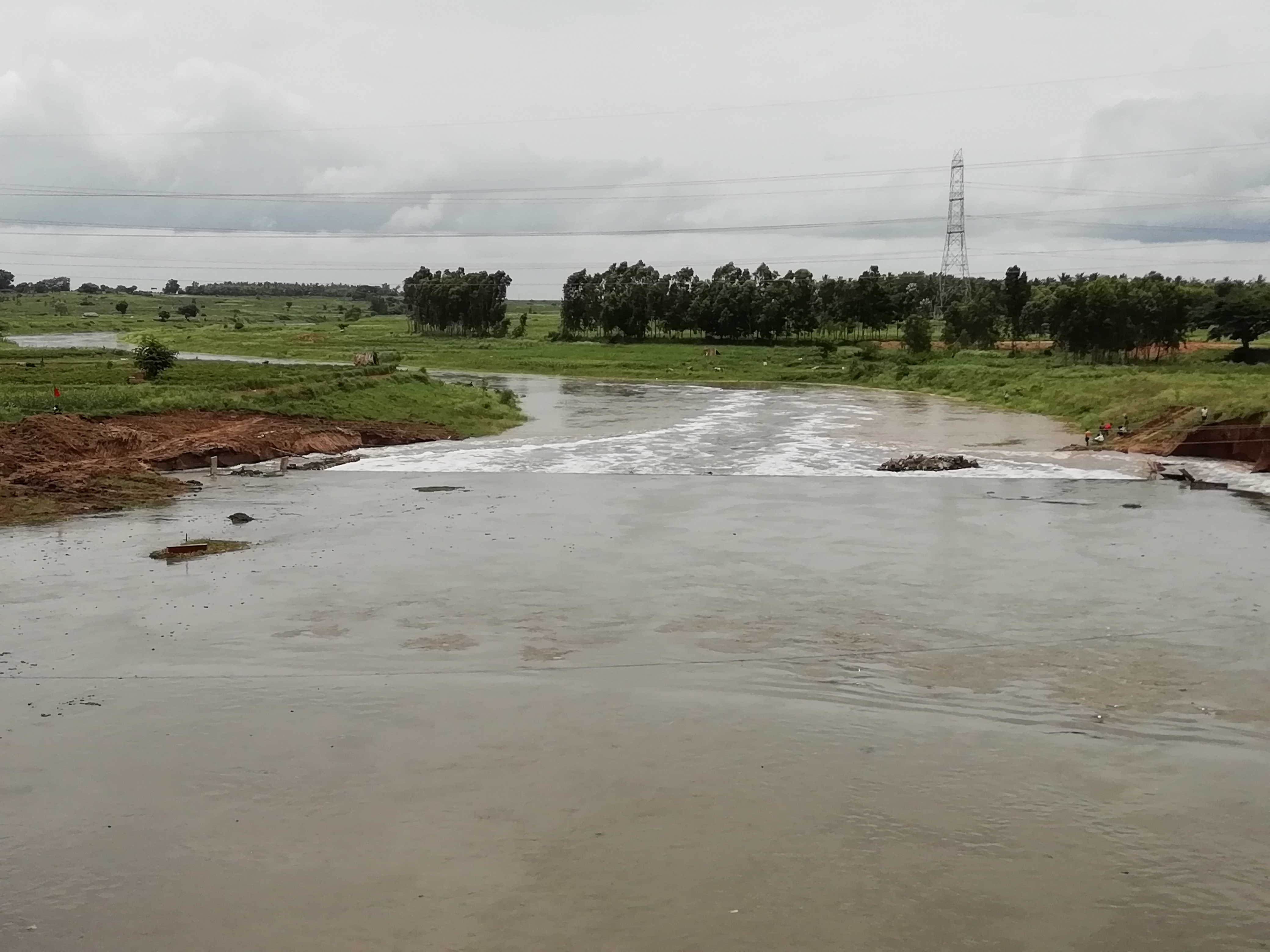 ಕನ್ನಡ: ಹೊಸರಾಮನಹಳ್ಳಿಯ ಬಳಿ ಲಕ್ಷ್ಮಣತೀರ್ಥ ನದಿಯು ತುಂಬಿ ಹರಿಯುತ್ತಿರುವುದು.